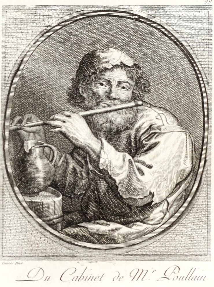 Un Paysan jouant de la flûte. The plate is part of J. B. P. Le Brun's 'Catalogue raisonné des tableaux, dessins, estampes (...) qui composoient le Cabinet de feu M. Poullain' (Paris, 1780)